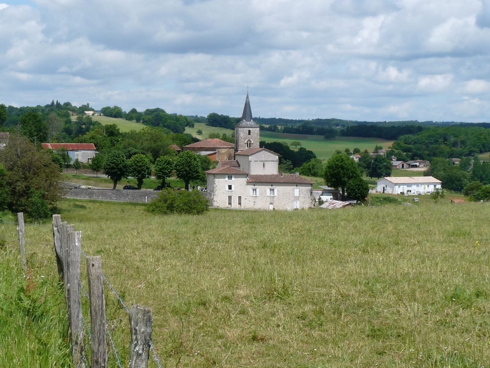 Bourg d'Orgedeuil, Charente, France. Le Massif de l'Arbre est à gauche.